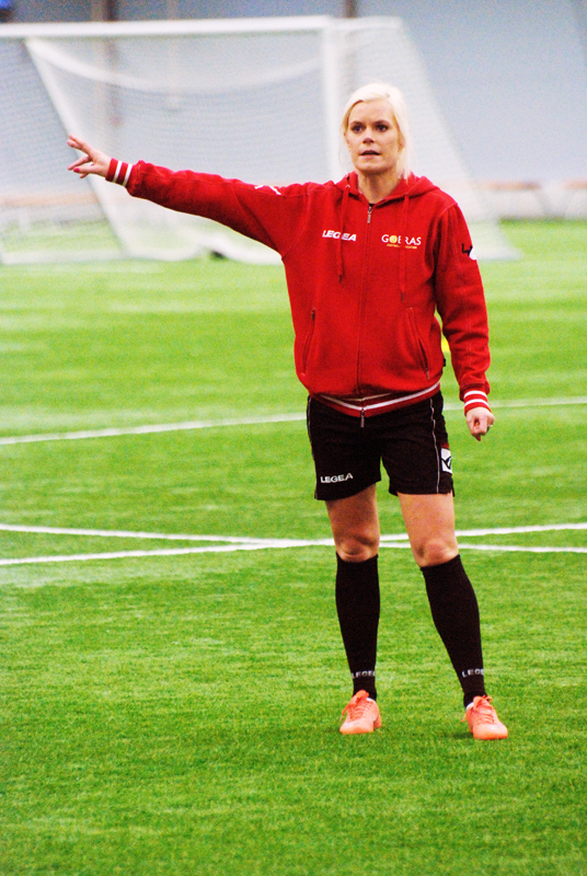 a_74_0200